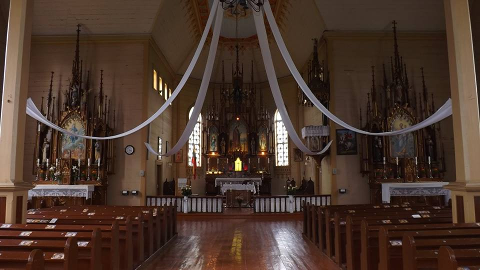 Didysis Šv. vyskupo Stanislovo altorius (cenre), Švč. Mergelės Marijos Škaplierinės altorius (kairėje), Šv. Juozapo altorius (dešinėje).